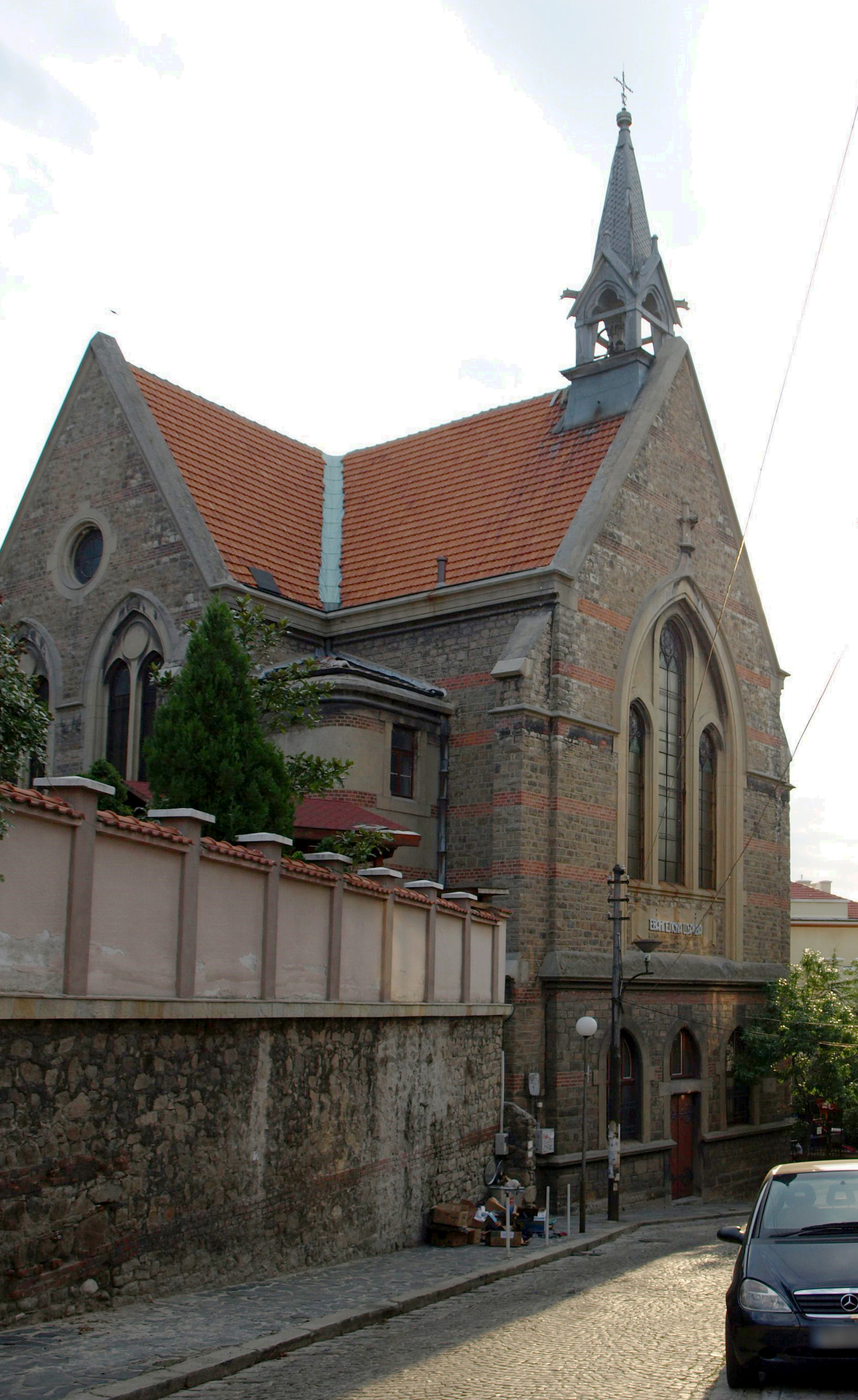 Evangelical Cathedral, Plovdiv, Bulgaria